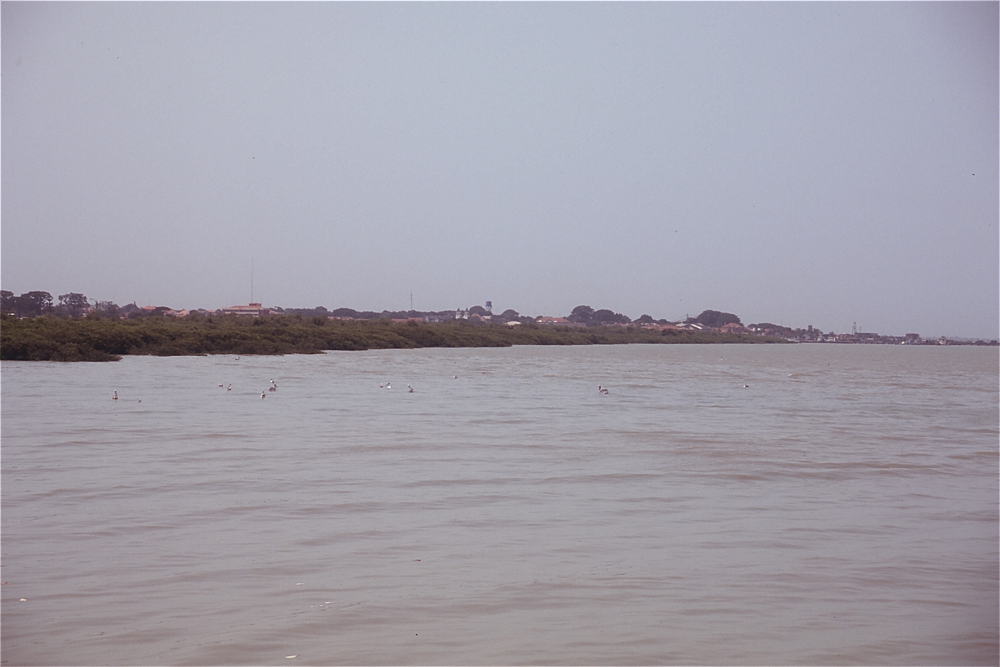 Bissau seen from Rio Geba